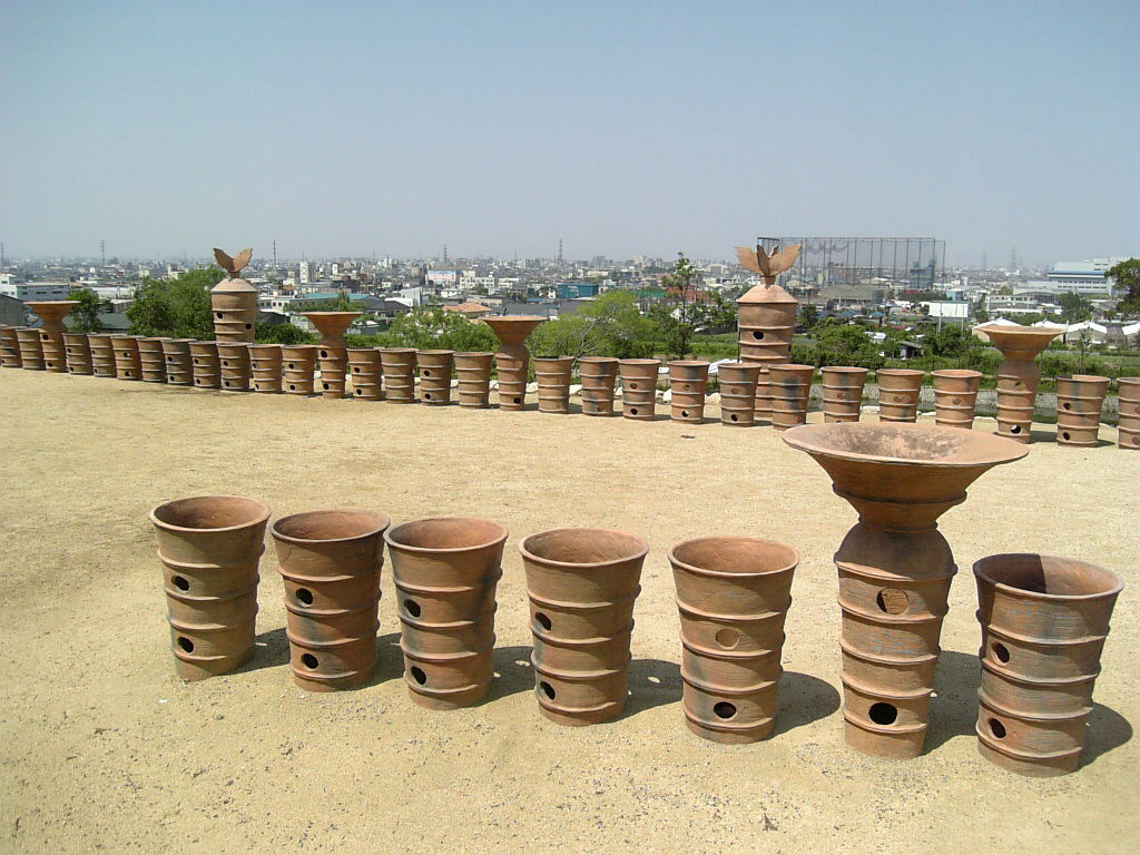 心合寺山古墳の円筒埴輪